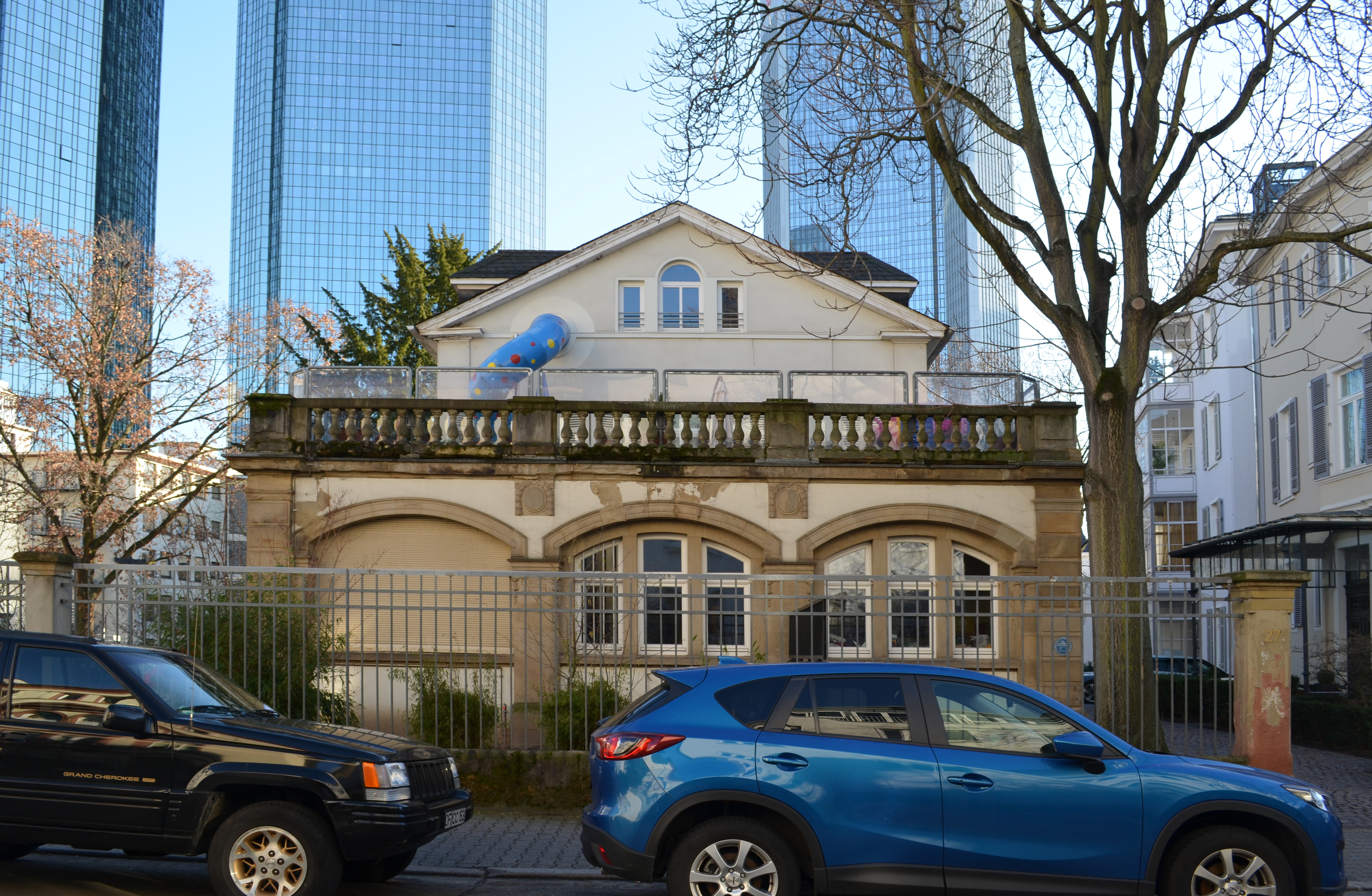 Frankfurt, Kettenhofweg 27